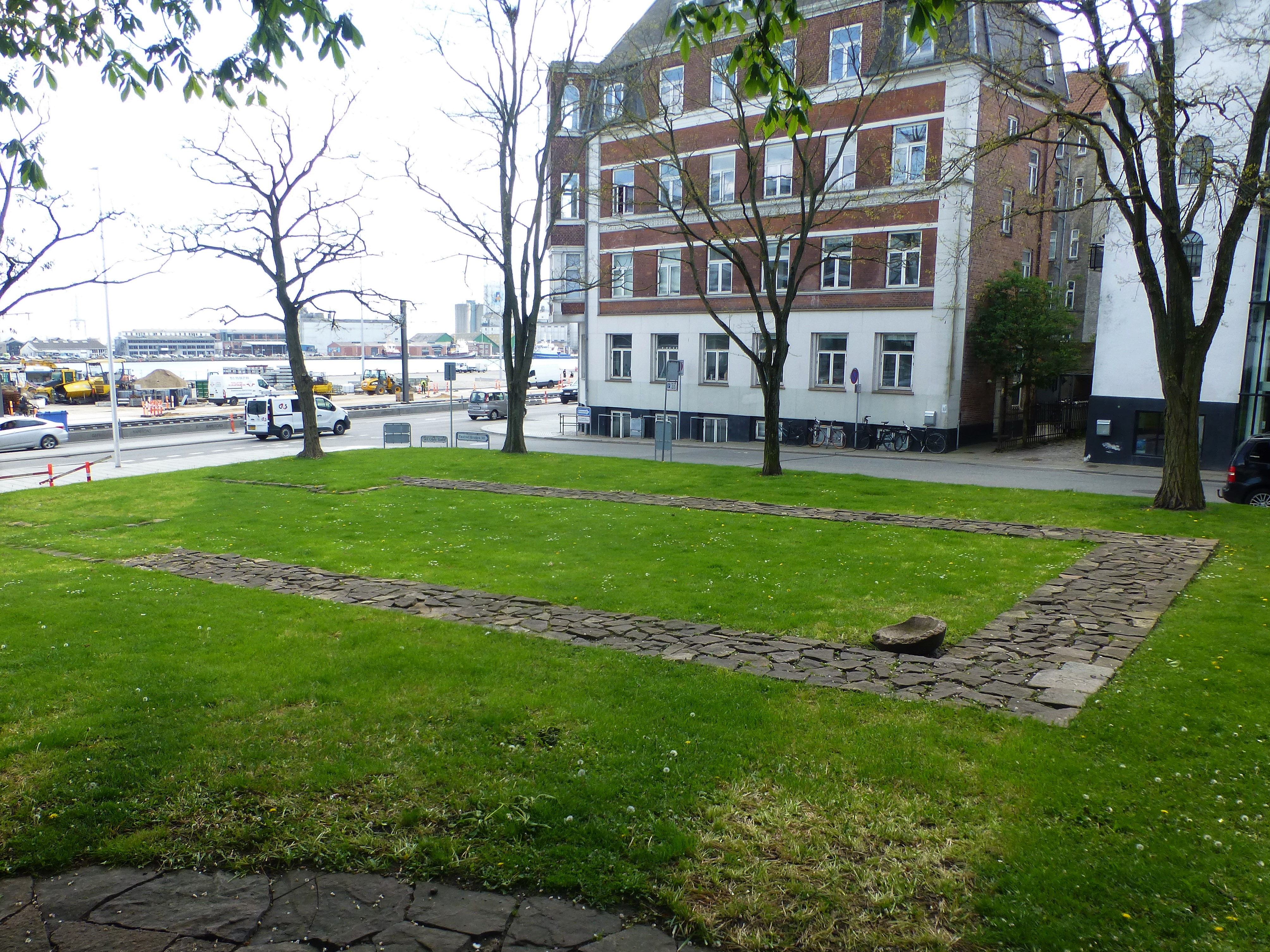 Sankt Oluf Kirke fundamentmarkering